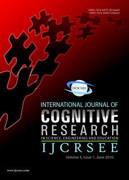 Корица часописа International Journal of Cognitive Research in Science, Engineering and Education (IJCRSEE)